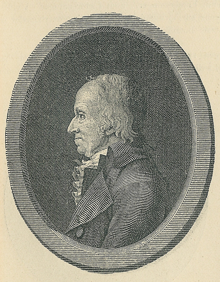 Henrich Callisen